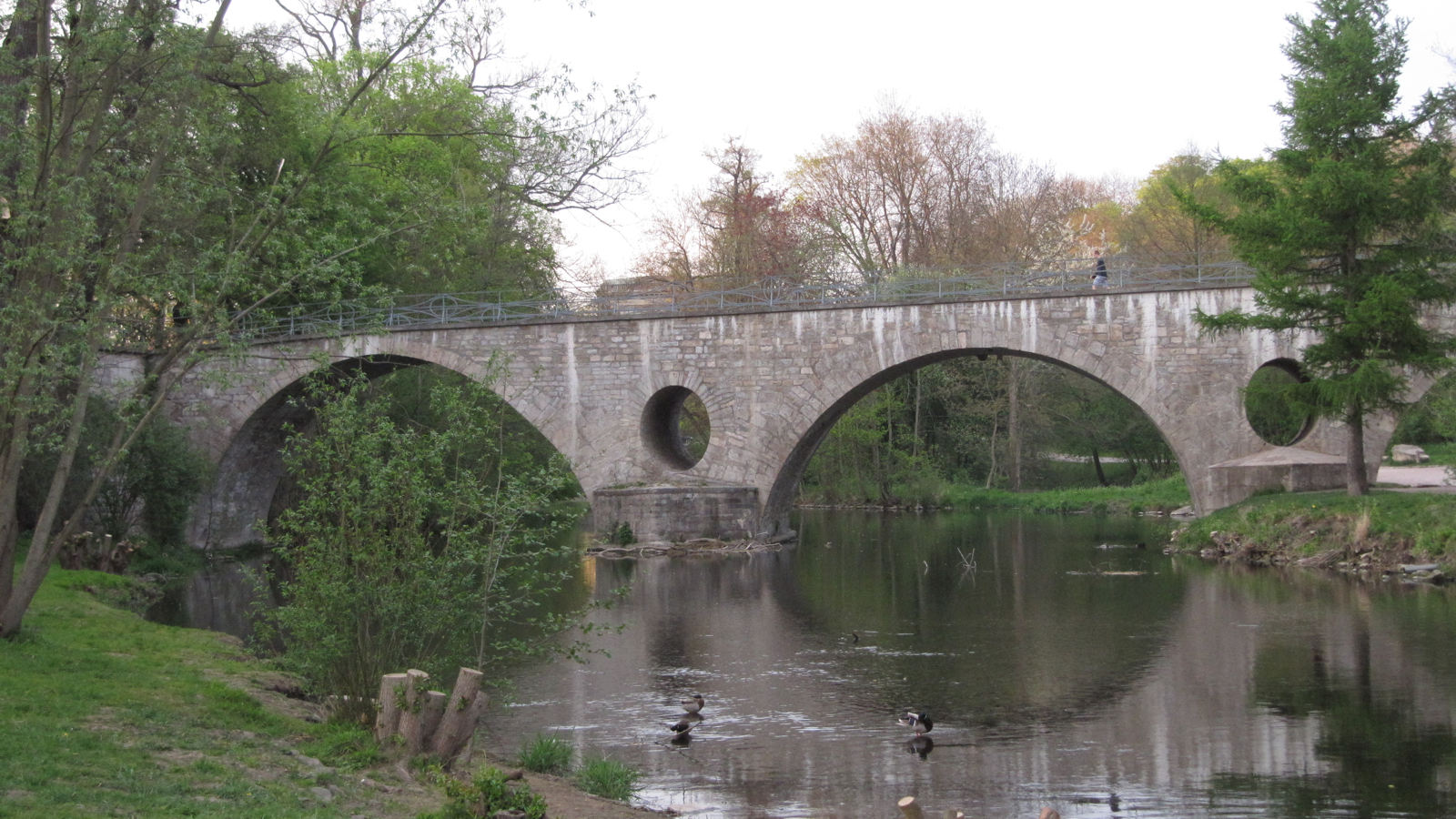 Sternbrücke über die Ilm am Schloss in Weimar, 2012